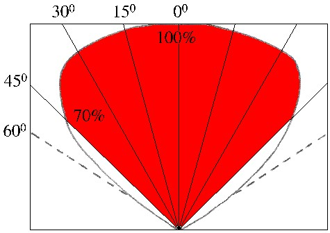 Vlammenmelder, Zichthoek Dutch, Jan Nijkamp, Sense-WARE Fire and Gas Detection BV